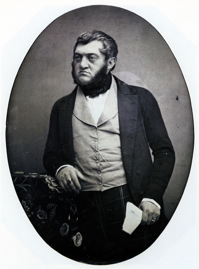 Porträt des Abgeordneten Georg von Vincke, 1848 Die 15 x 11,5 cm große Daguerreotypie Jacob Seibs zeigt den Abgeordneten der Deutschen Nationalversammlung Georg von Vincke (1811-1875). Von Vicke war Jurist und von 1837-1848 Landrat des Kreises Hagen in Westfalen. In der Deutschen Nationalversammlung von 1848/49, in der er den 13. Westfälischen Wahlkreis vertrat, zählte er zur konservativen Franktion. 1852, wenige Jahre nach dieser Aufnahme, duellierte er sich mit Otto von Bismarck. Die Aufnahme Seibs gehört zu den frühen Photographien, die 1848 von Mitgliedern der Nationalversammlung in Frankfurt angefertigt wurden.